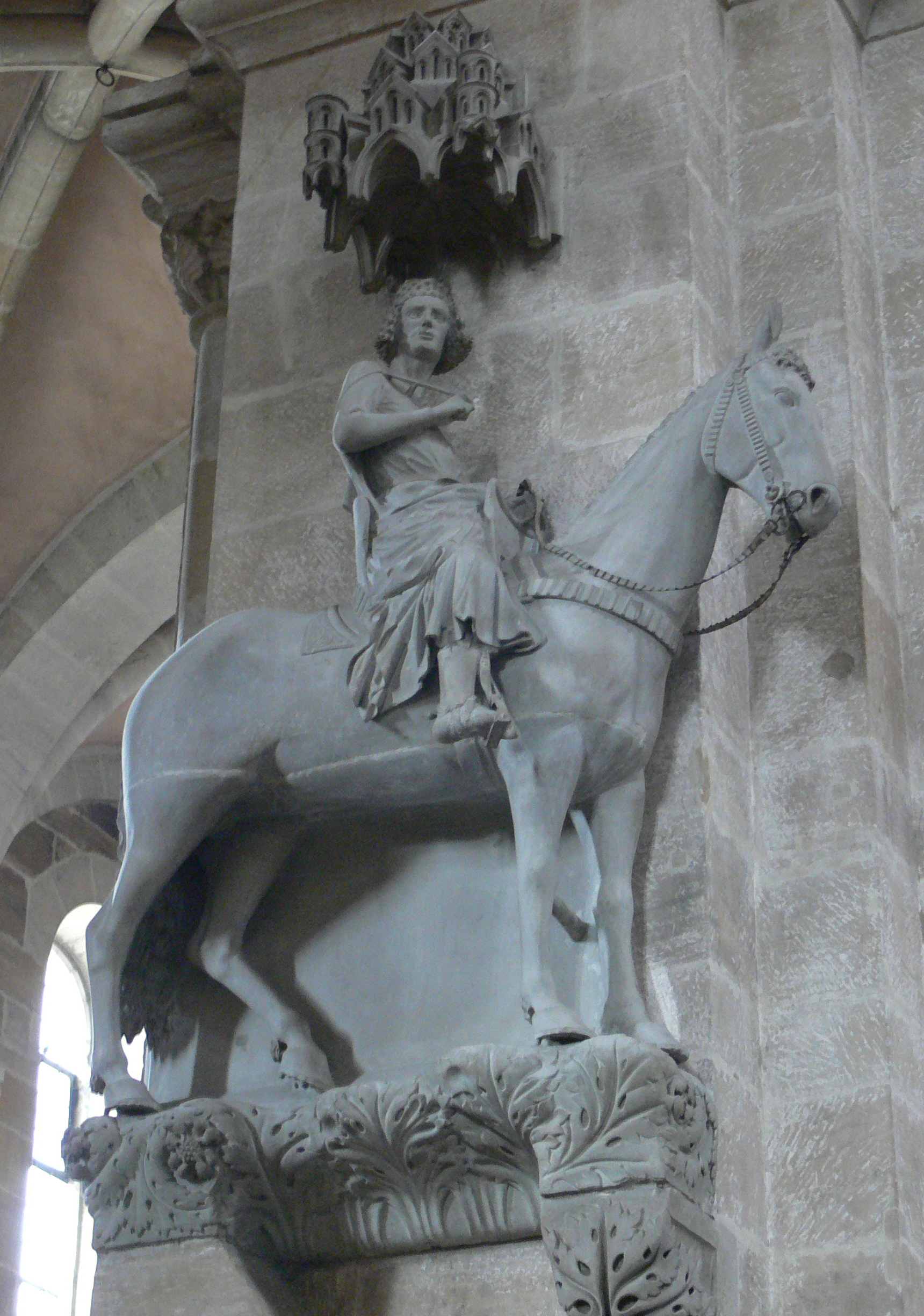 Bamberg, Dom Bamberger Reiter